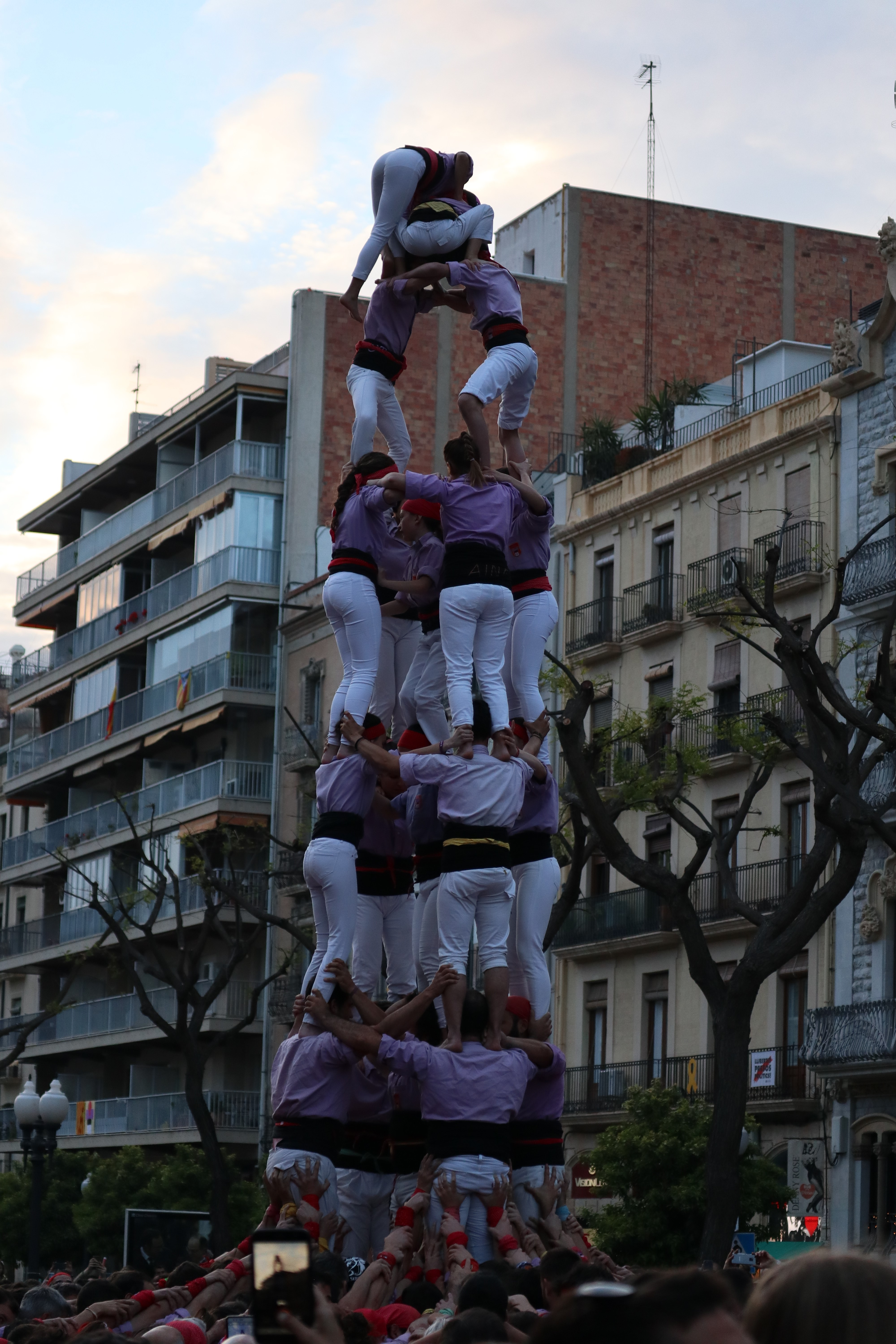 Katalánci se snaží postavit lidské pyramidy co nejvyšší, nejoriginálnější a nejsložitější. Tato tradice je zapsána pod ochranu světového kulturního dědictví UNESCO